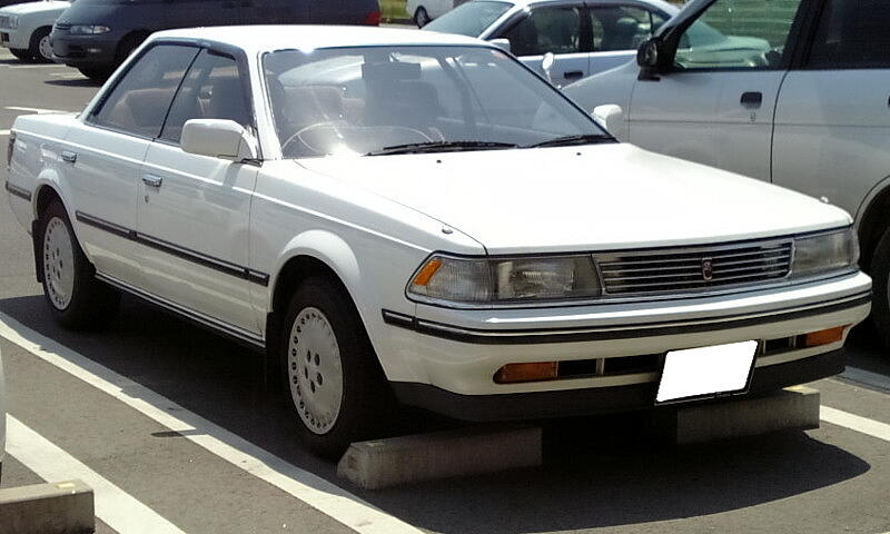 トヨタ・カリーナED（初代・後期型）